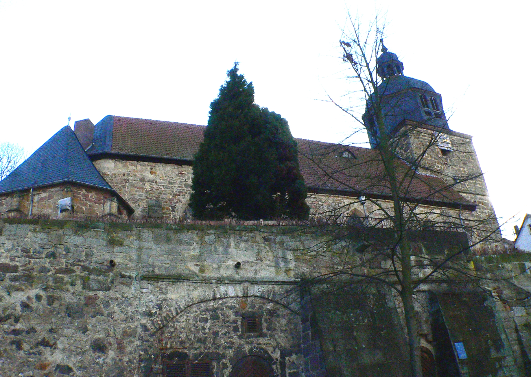 Gudensberg (Hessen), ev. Pfarrkirche St. Margarethe